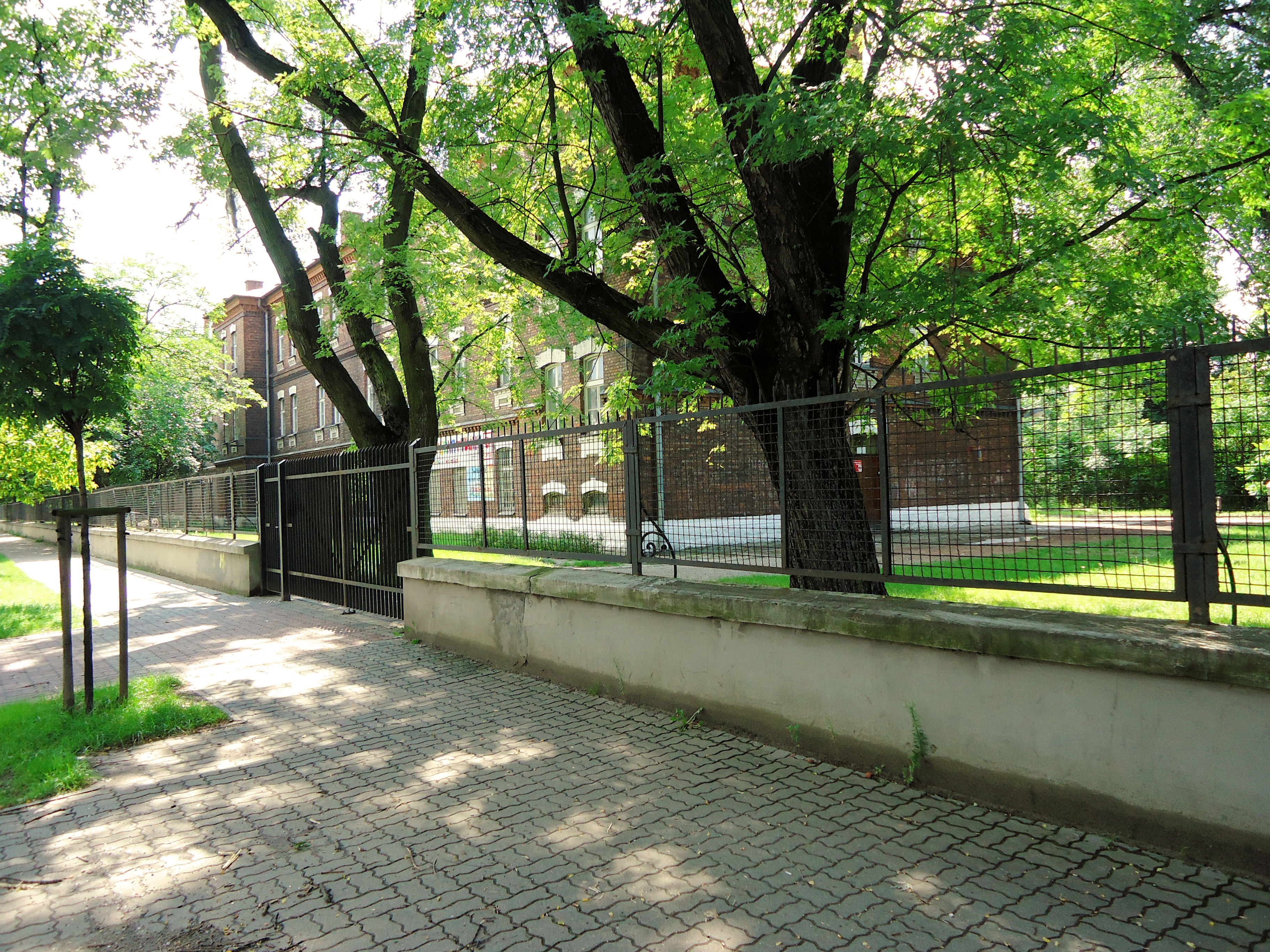 Budynek nr 3 kompleksu koszarowego 36 Pułku Piechoty Legii Akademickiej przy ul. 11 Listopada w Warszawie (stan w dniu 14 sierpnia 2011)